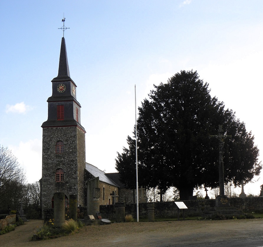 Église Saint-Méloir, colonnes antiques et borne milliaire de Saint-Méloir-des-Bois (22).